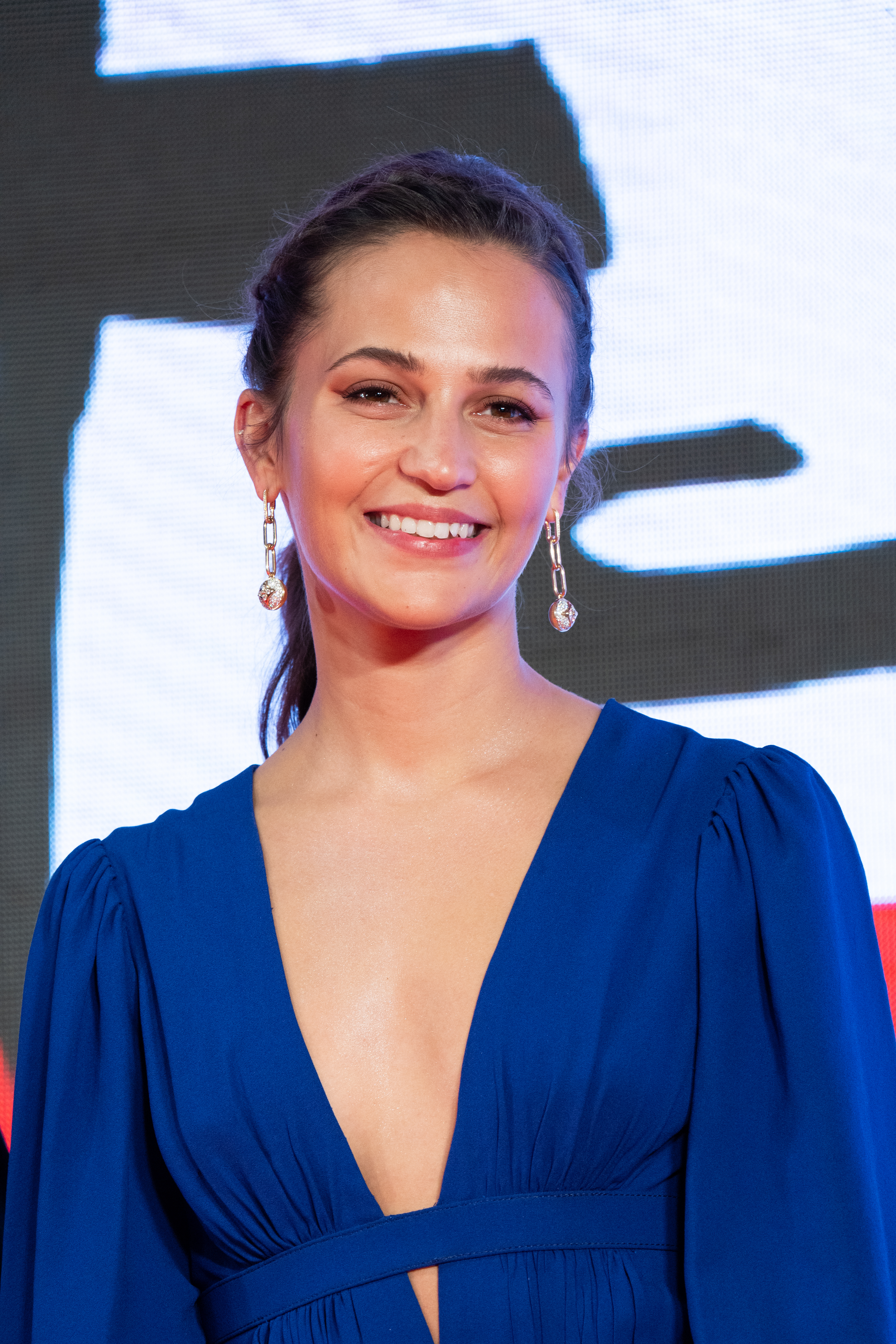 第32回 東京国際映画祭 オープニングセレモニー アリシア・ヴィキャンデル (アースクエイクバード)